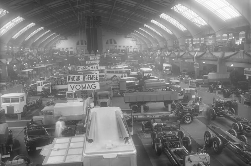 Die Eröffnung der grossen Automobilausstellung in den Ausstellungshallen am Kaiserdamm in Berlin! Ueberblick über die Lastwagen-Ausstellung in den Ausstellungshallen.